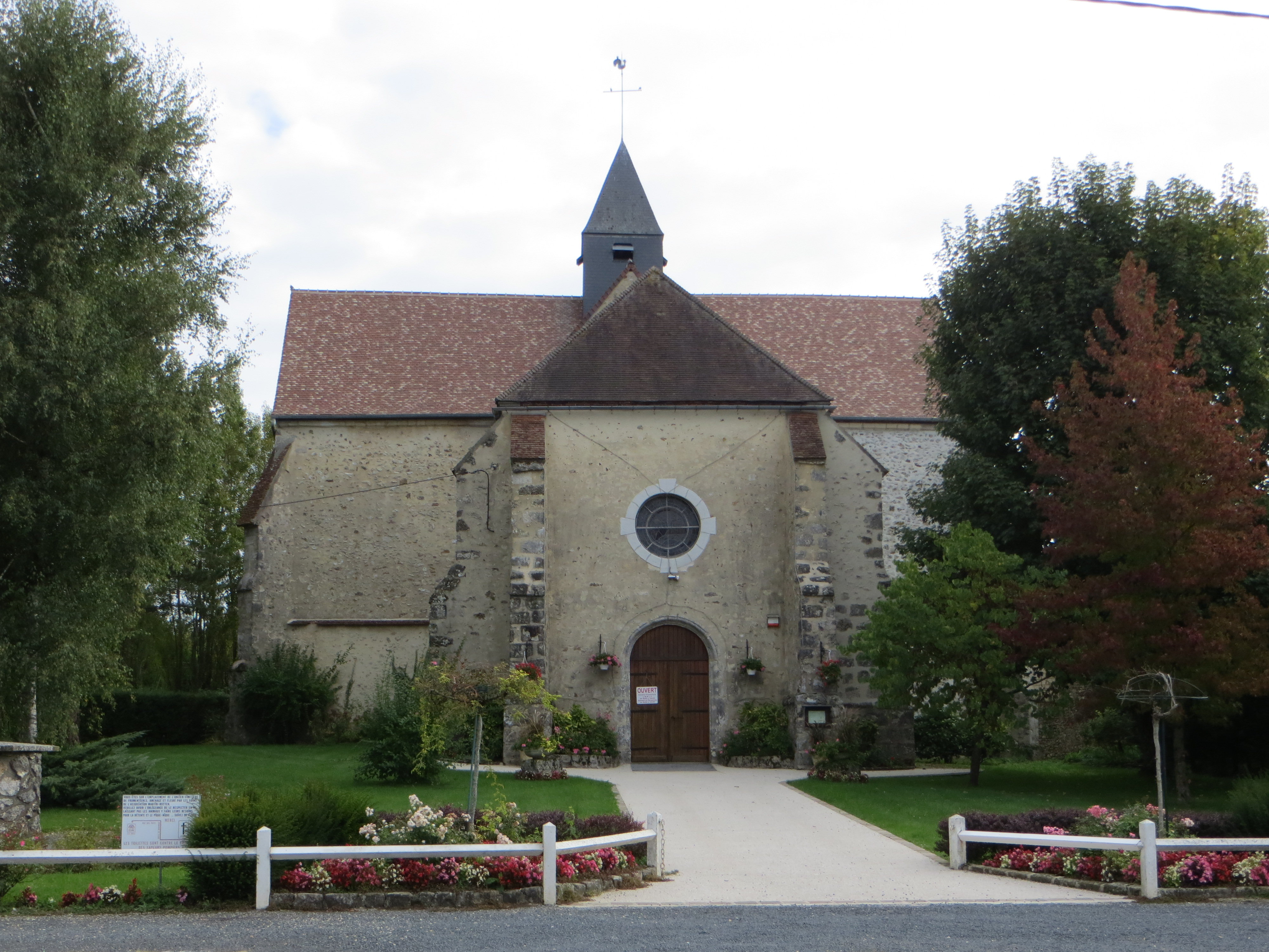 Vue générale de l'église